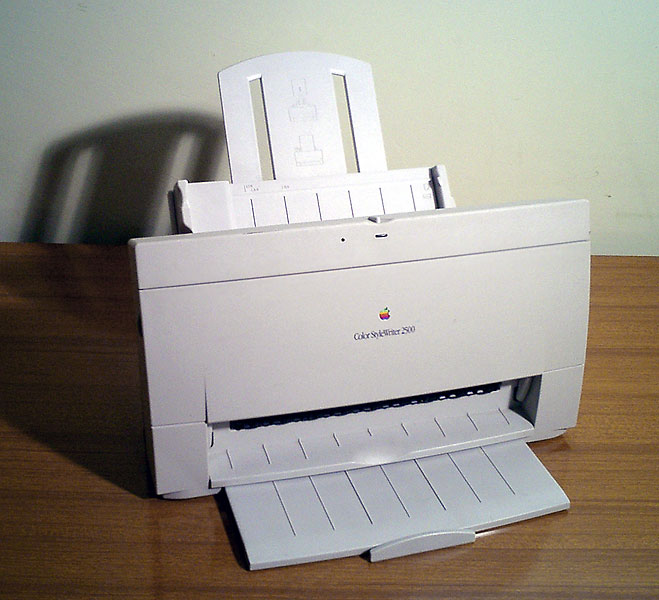 Esterno di una Apple color Stylewriter 2500